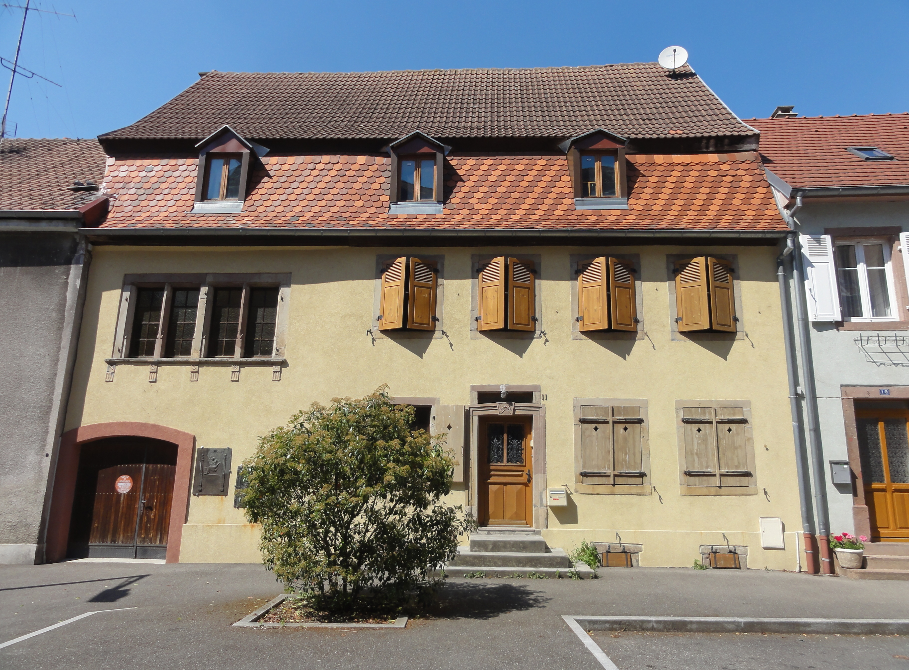 Alsace, Haut-Rhin, Ensisheim, Maison (XVIe-XIXe), 11 place de l'Eglise. .